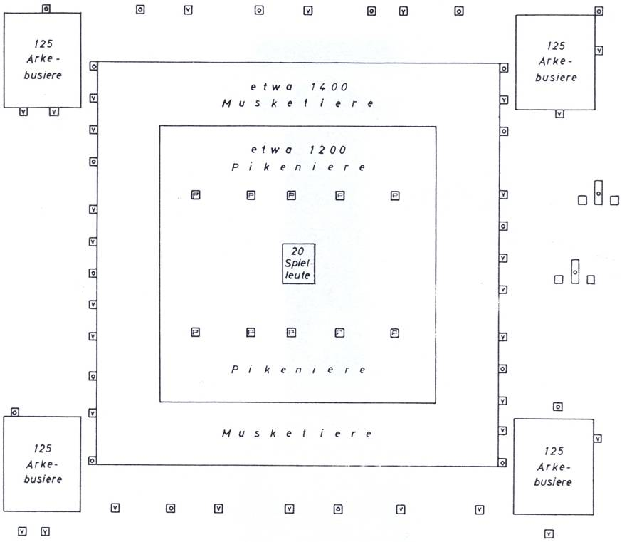 Spanisches Tercio um 1600��, ca 2.484 Mann